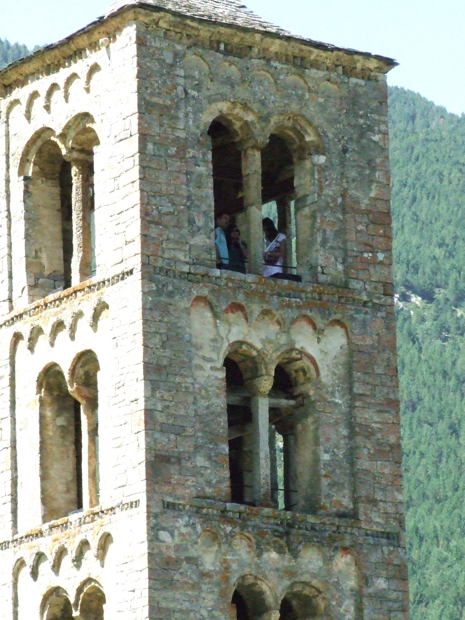 Detall del campanar de Sant Climent de Taüll (Vall de Boí, Alta Rubagorça)